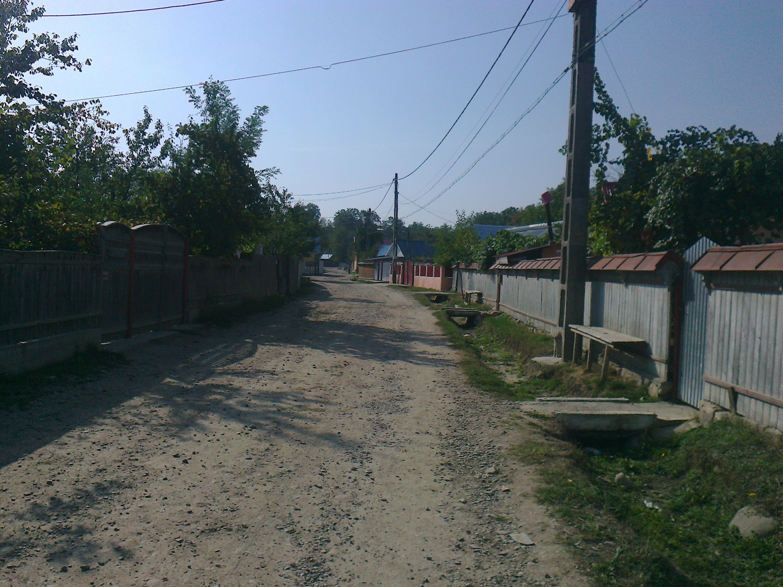 Drumul ce traversează Vlașca